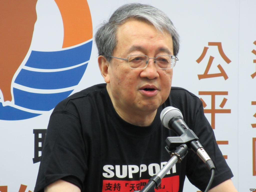 台灣青年反共救國團理事長 林保華